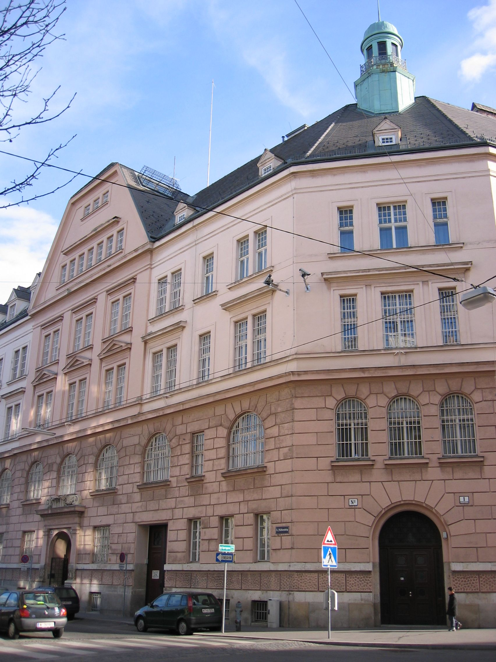 Justizanstalt Mittersteig, Wien Margareten